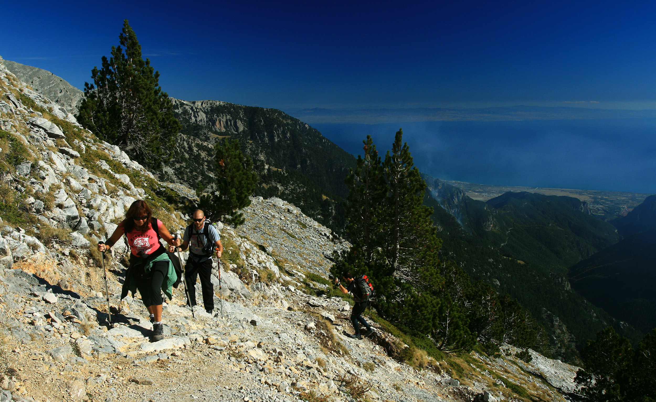 Ορειβάτες κατευθύνονται προς τη Σκάλα This is a photography of Natura 2000 protected area with ID GR1250001